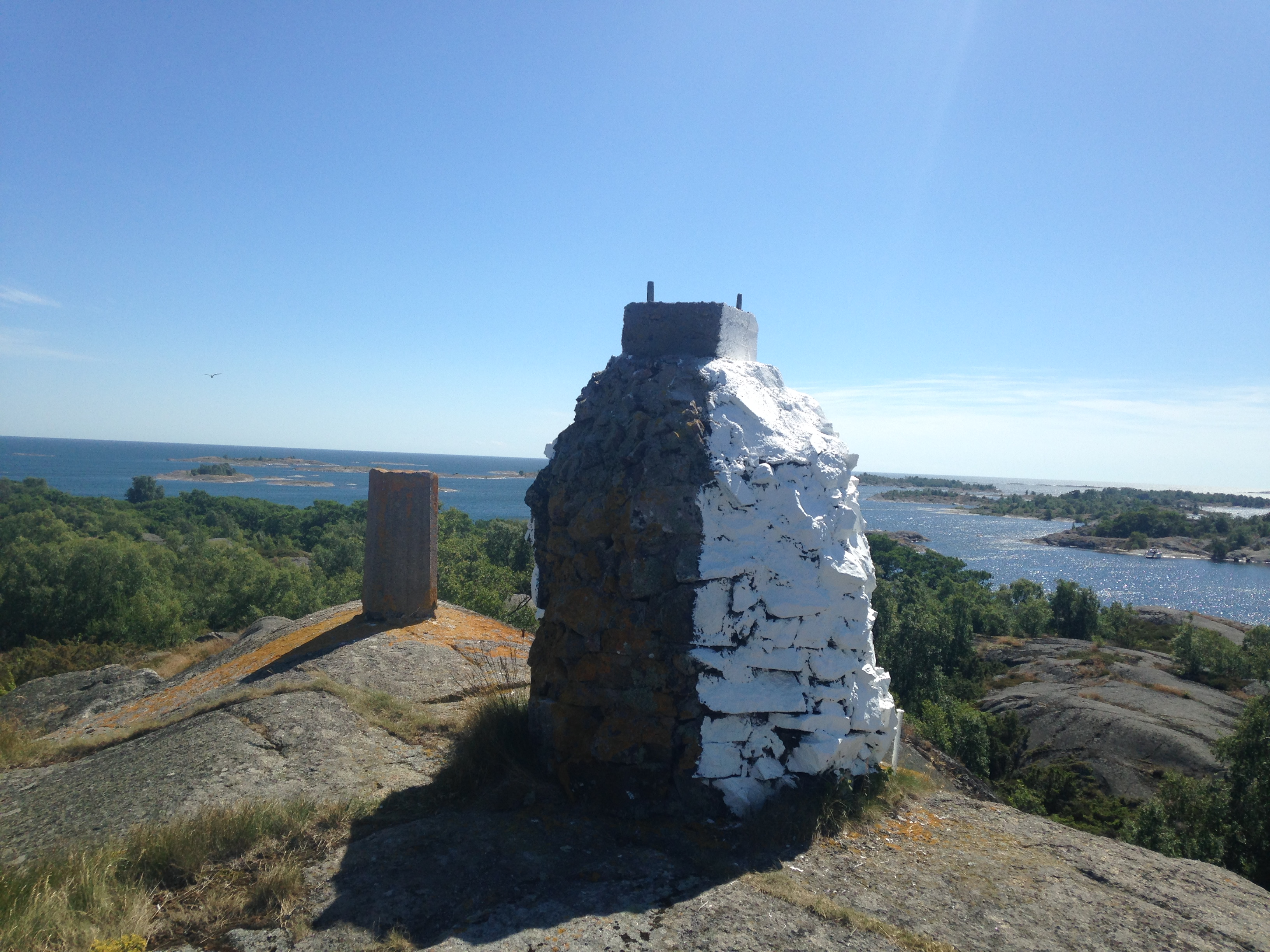 Långviksskär Söderö stenkummel